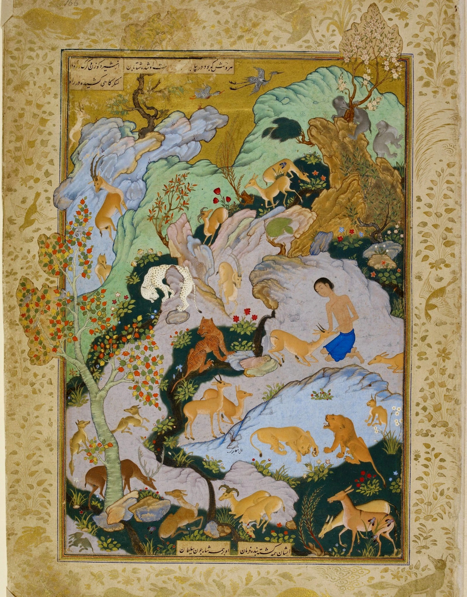 Miniature: Məcnun Səhrada (Majnun in desert)